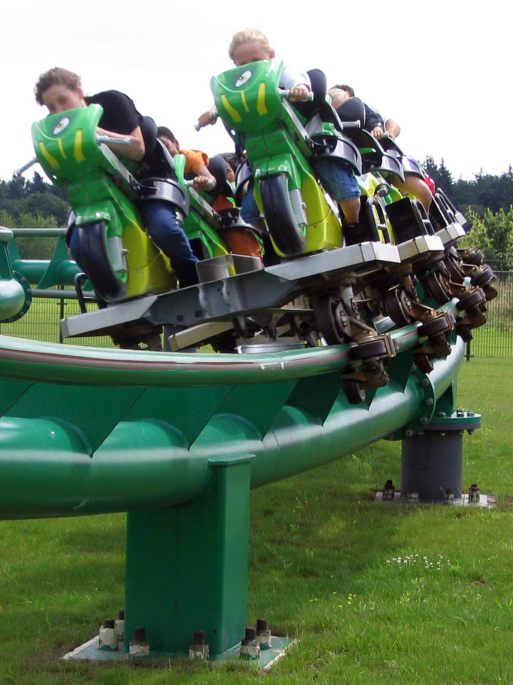 Boosterbike at Toverland, Netherlands